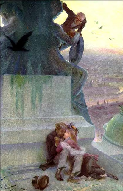 L'une des cinq aquarelles d'André Castaigne illustrant la première édition américaine du Fantôme de l'Opéra de Gaston Leroux (1911).